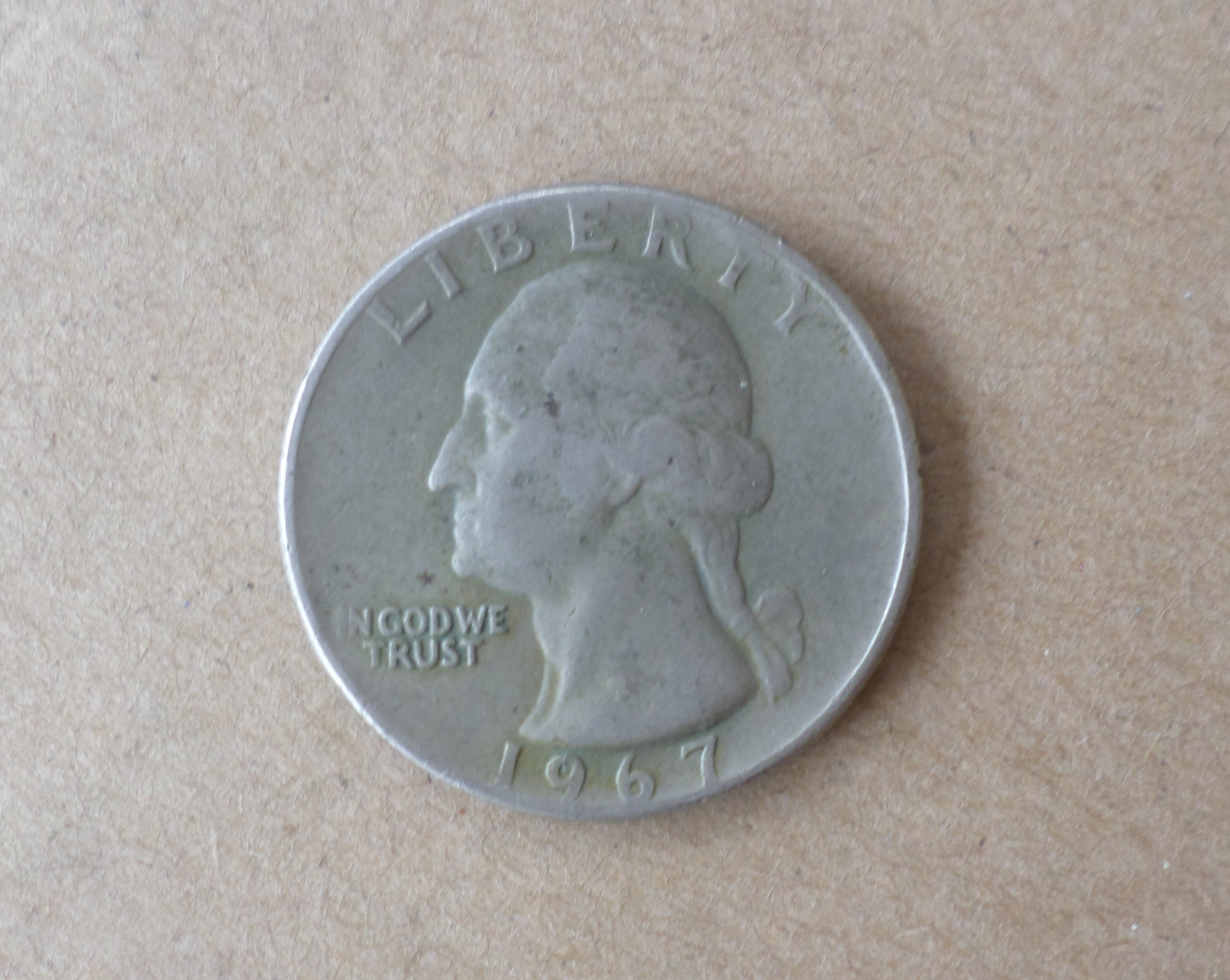 Moneda de 1/4 de US dólar (anverso)